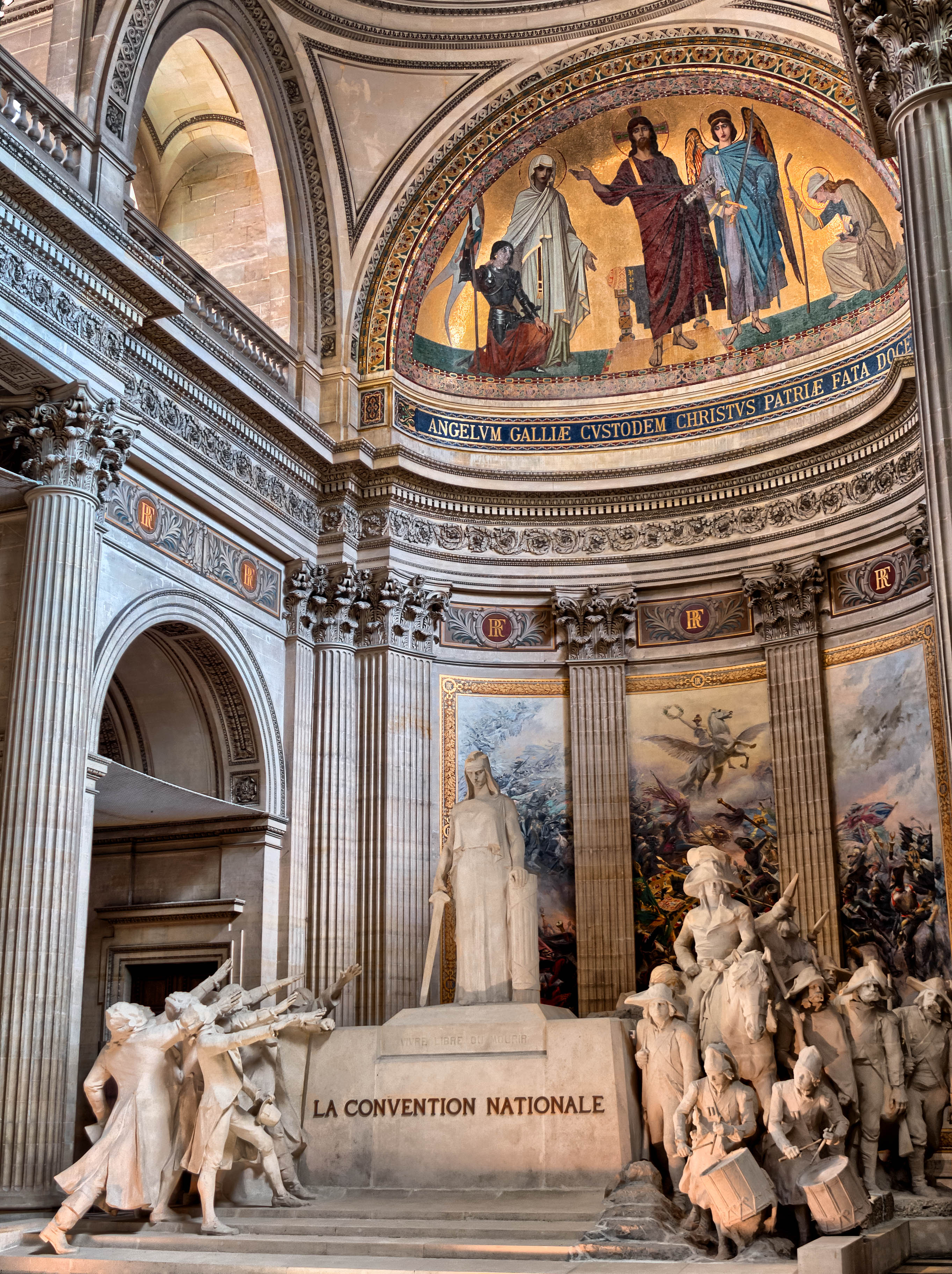 La Convention Nationale by François-Léon Sicard, Paris.